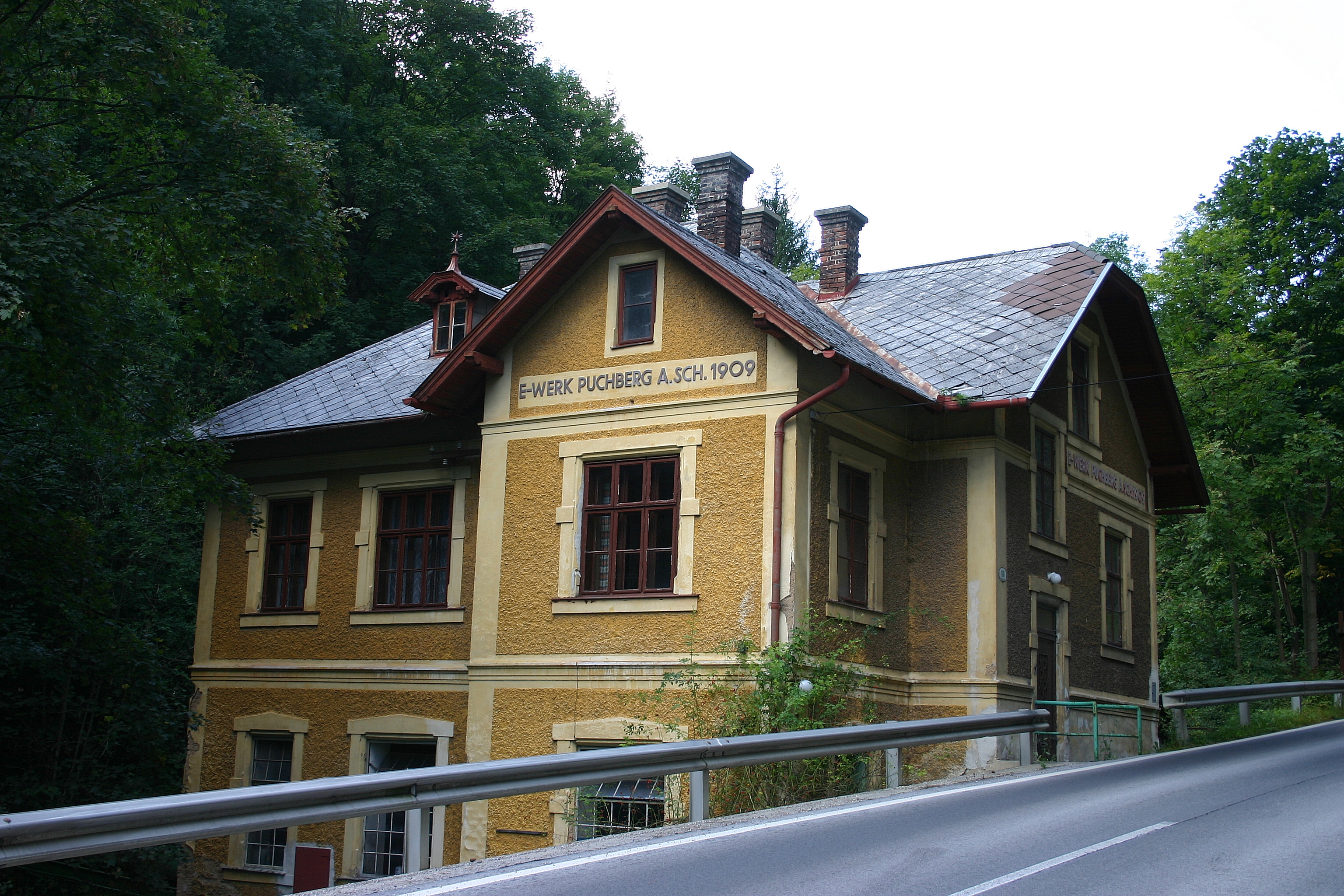 Puchberg am Schneeberg – Elektrizitätswerk an der Sierning, errichtet 1909